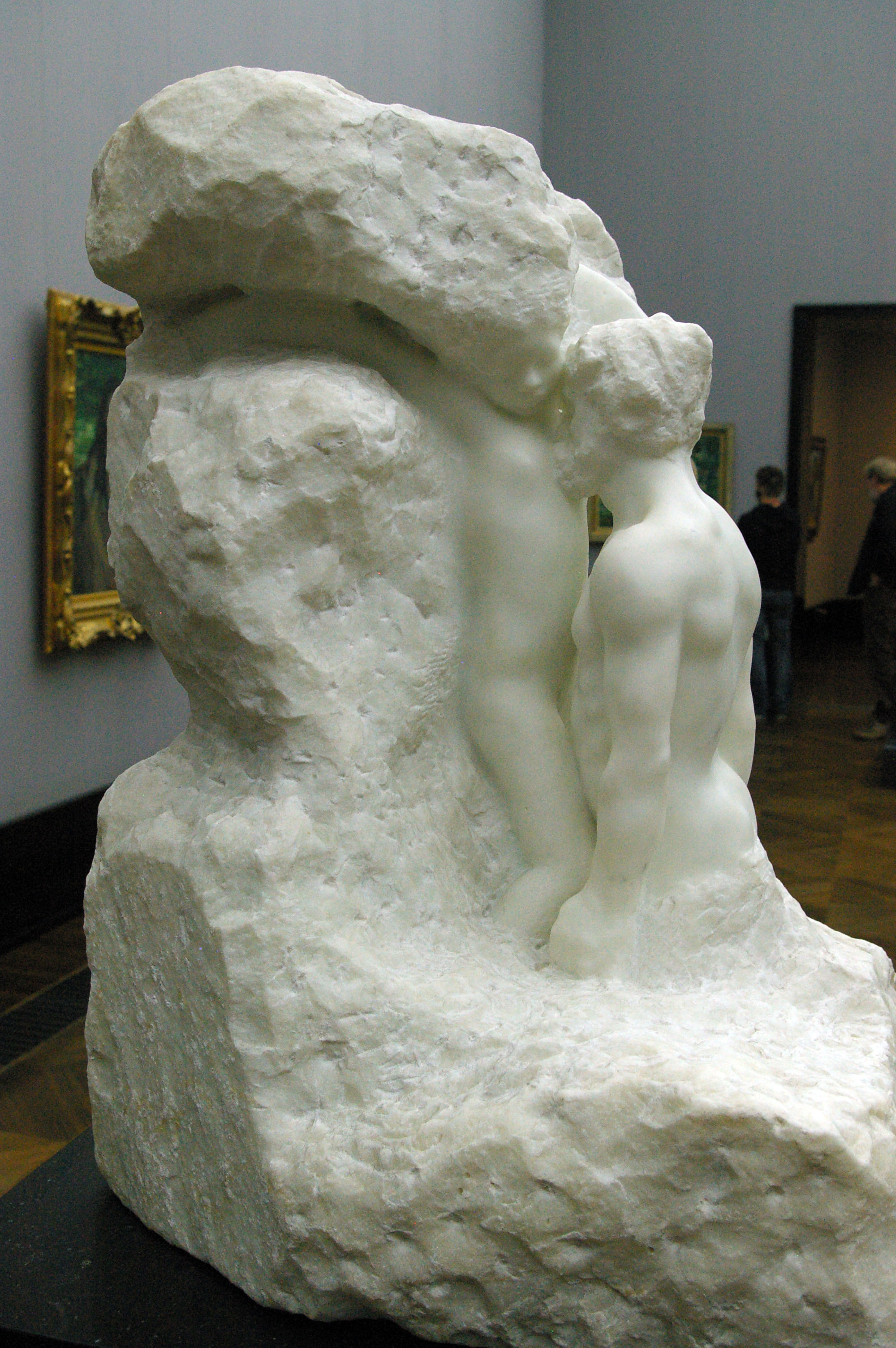 Rodin, Muž a jeho myšlenka